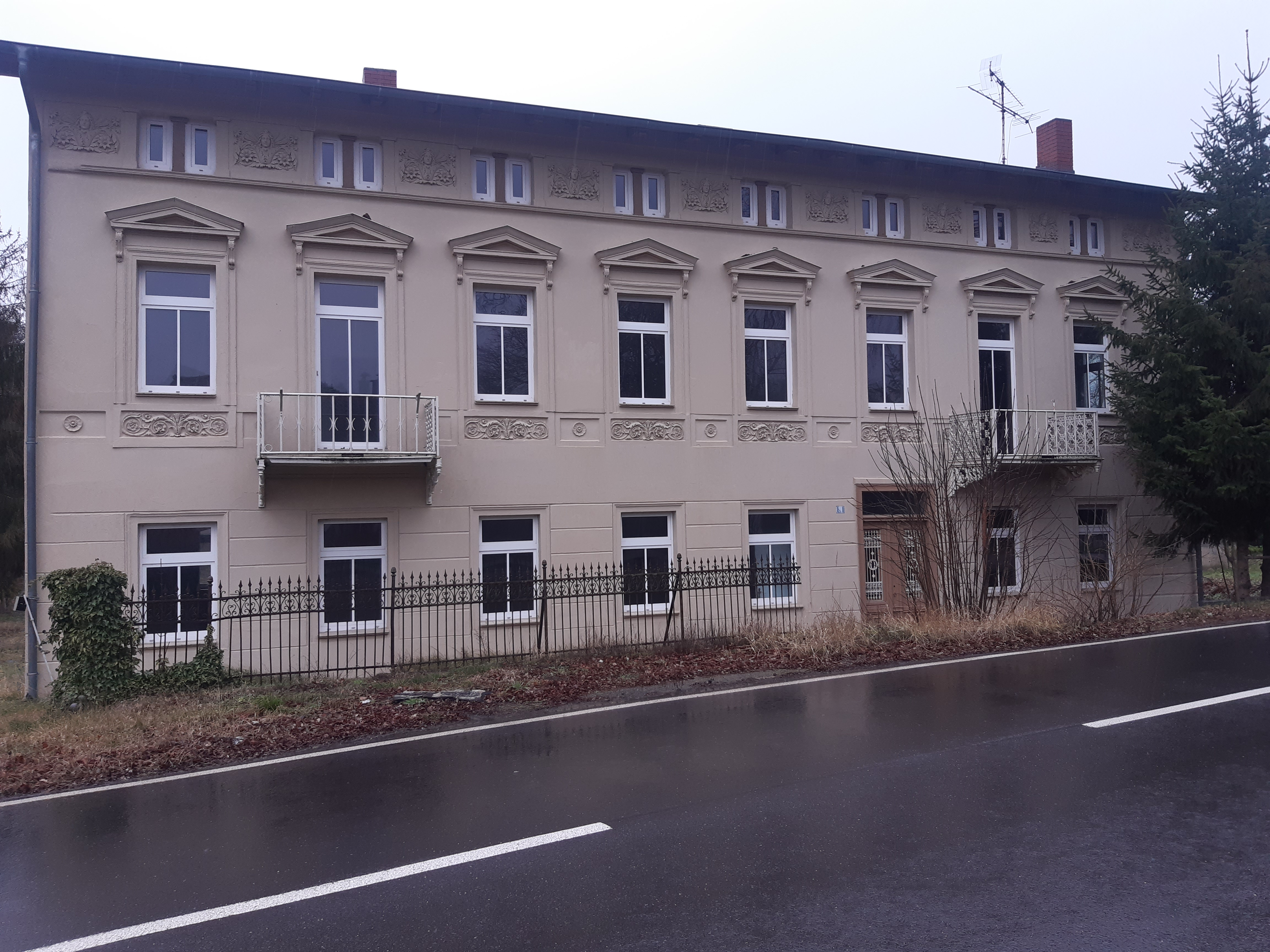 Teich